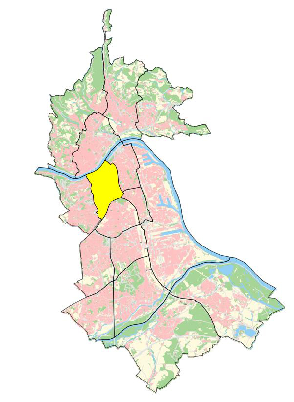 Karte von Linz mit den Grenzen der statistischen Bezirke - Bezirk Innere Stadt hervorgehoben, gültig ab 1. Jänner 2014. Datenquelle: CC-BY-3.0: Stadt Linz